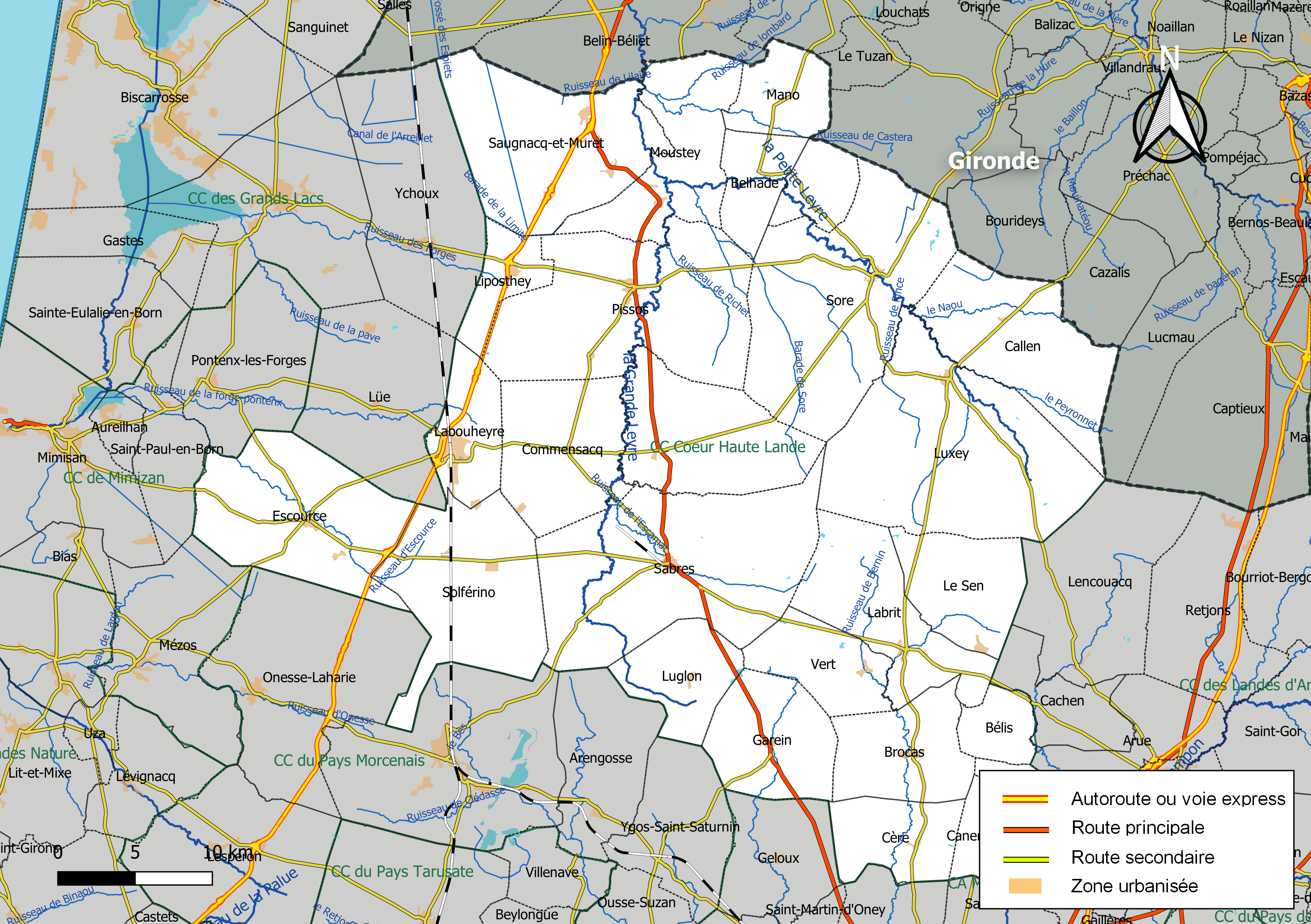 Carte géographique de la Communauté de communes Cœur Haute Lande, département des Landes, France. Composition au 1er janvier 2019.